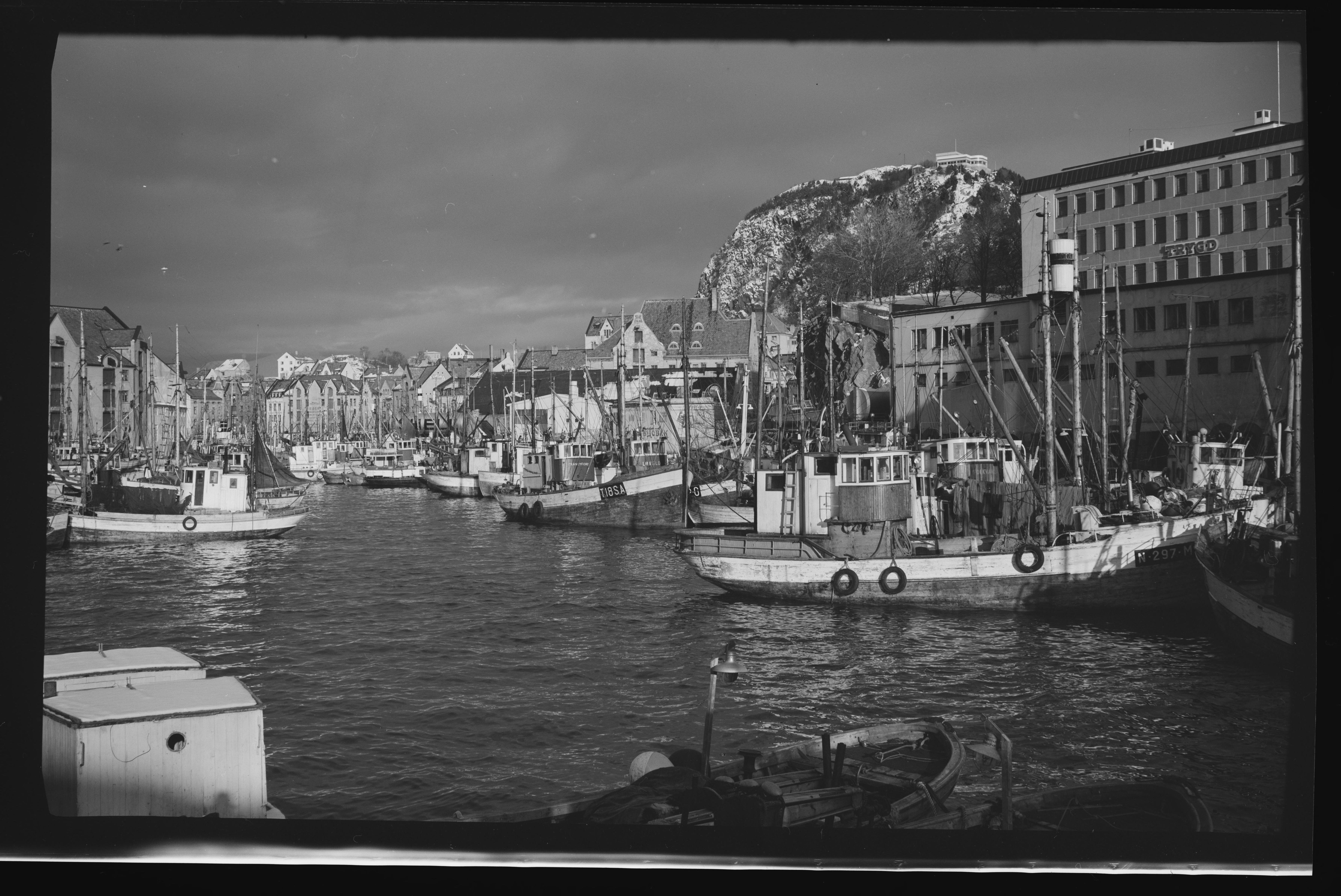 Bildet er hentet fra Nasjonalbibliotekets bildesamling Ålesund, Ålesund, Møre og Romsdal